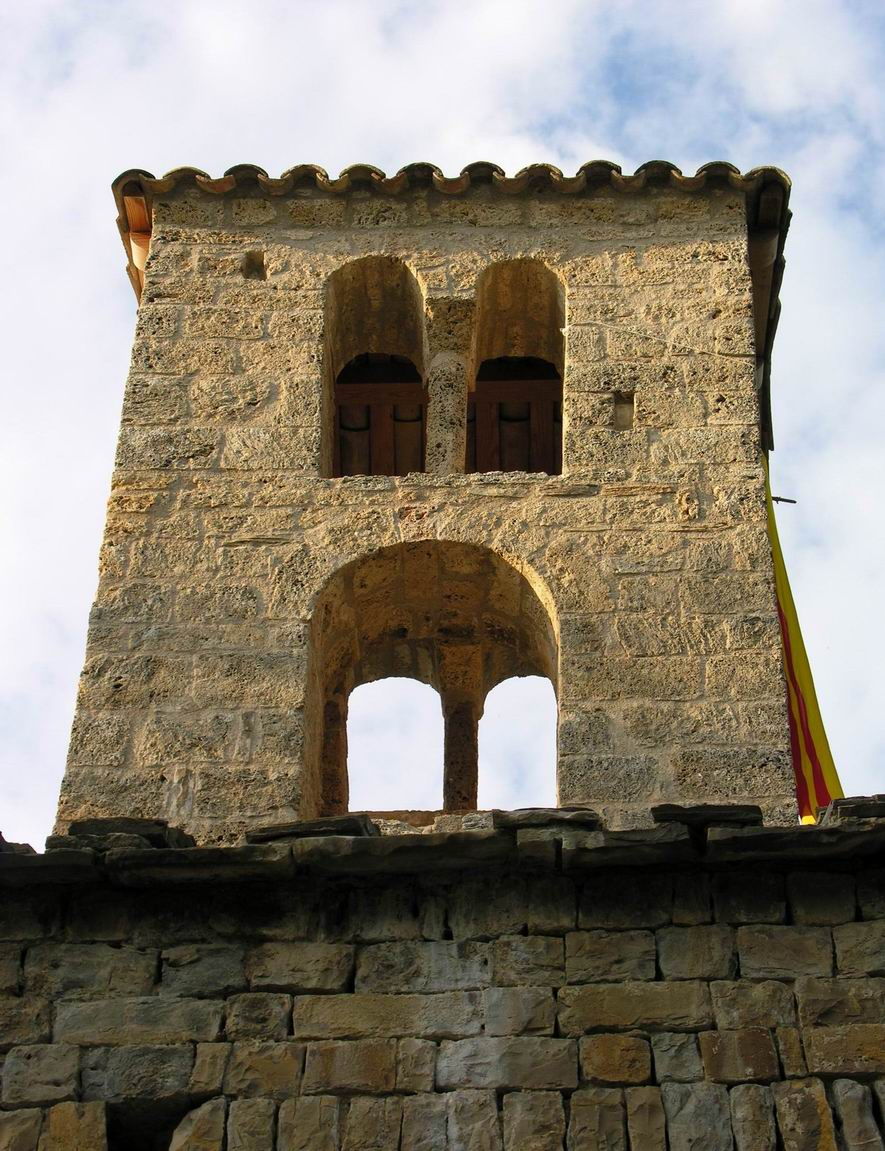 Campanar de Sant Sadurní de Rotgers, a Borredà (Berguedà)